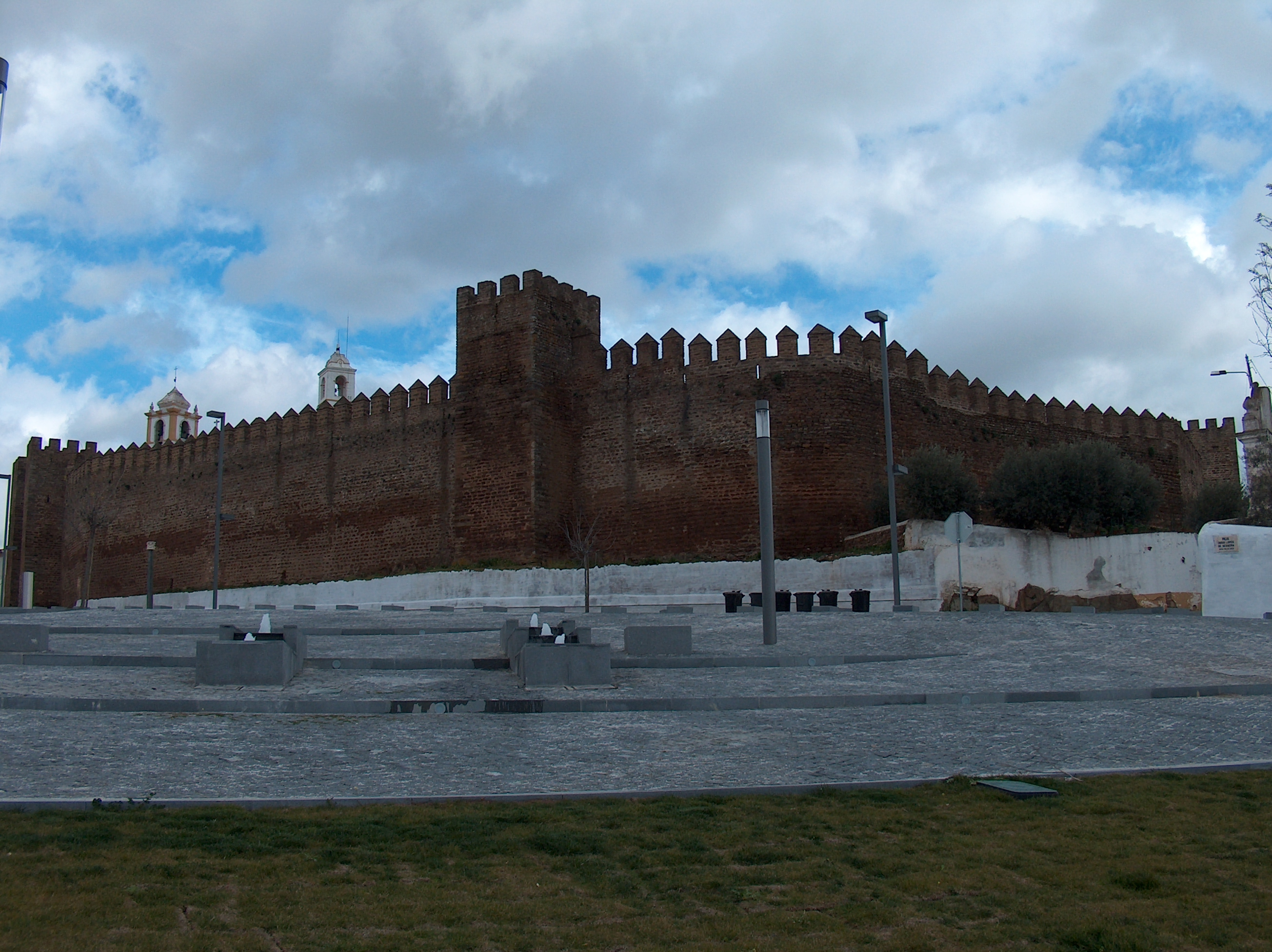 Castelo do Alandroal